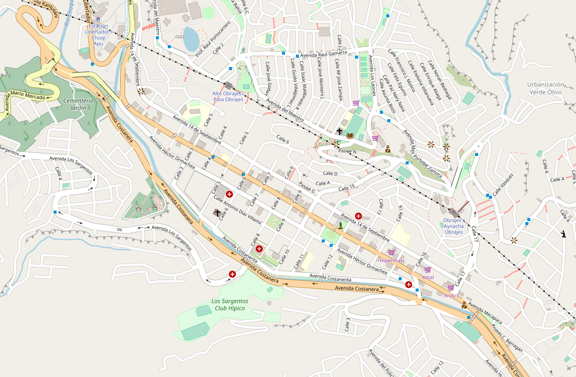 mapa del barrio de Obrajes en la ciudad de La Paz